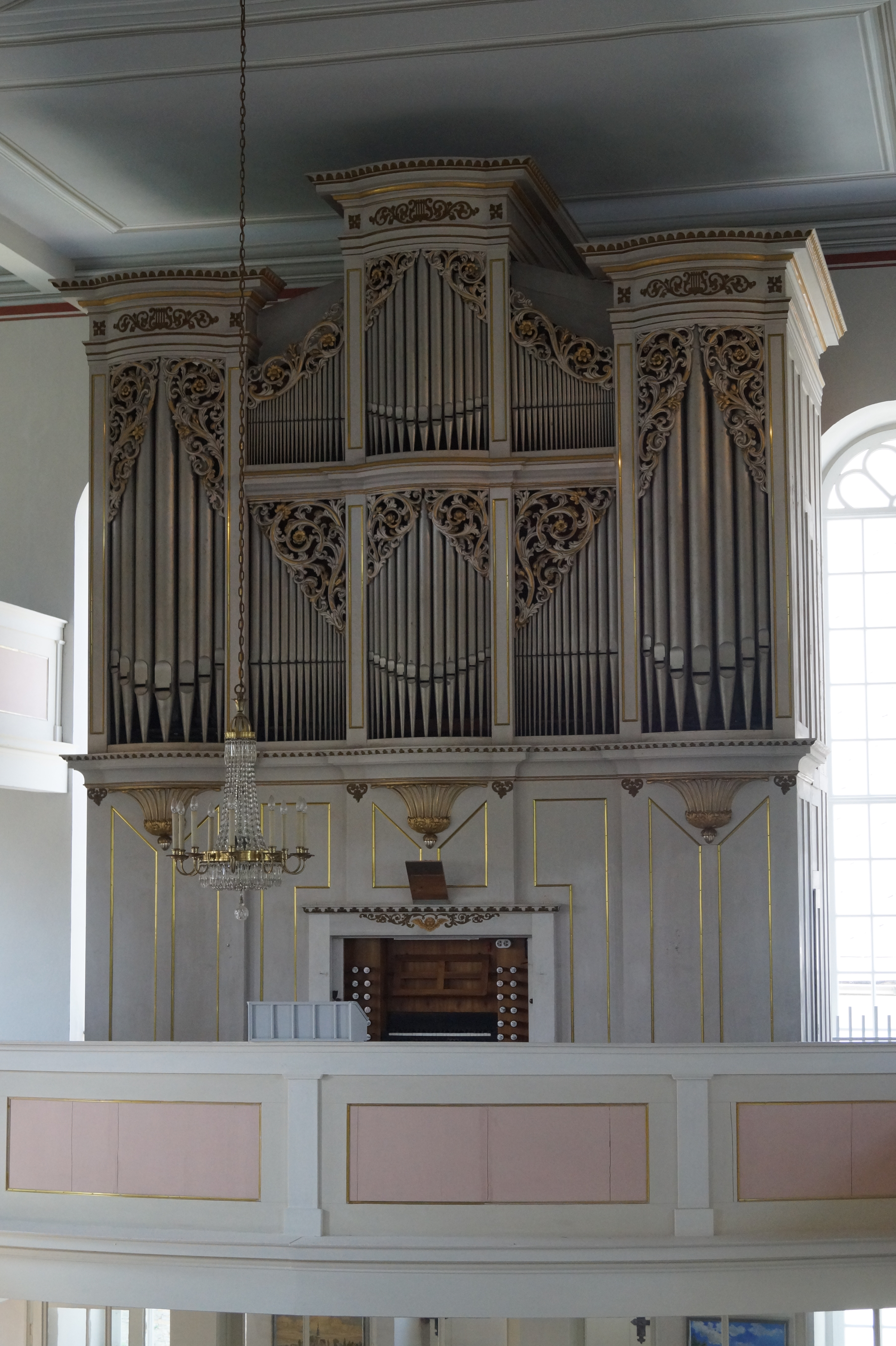 Göthel-Orgel in der St.-Nikolai-Kirche in Grünlichtenberg (gebaut 1866/67/ op. 21/ 21 Register/ II/P )